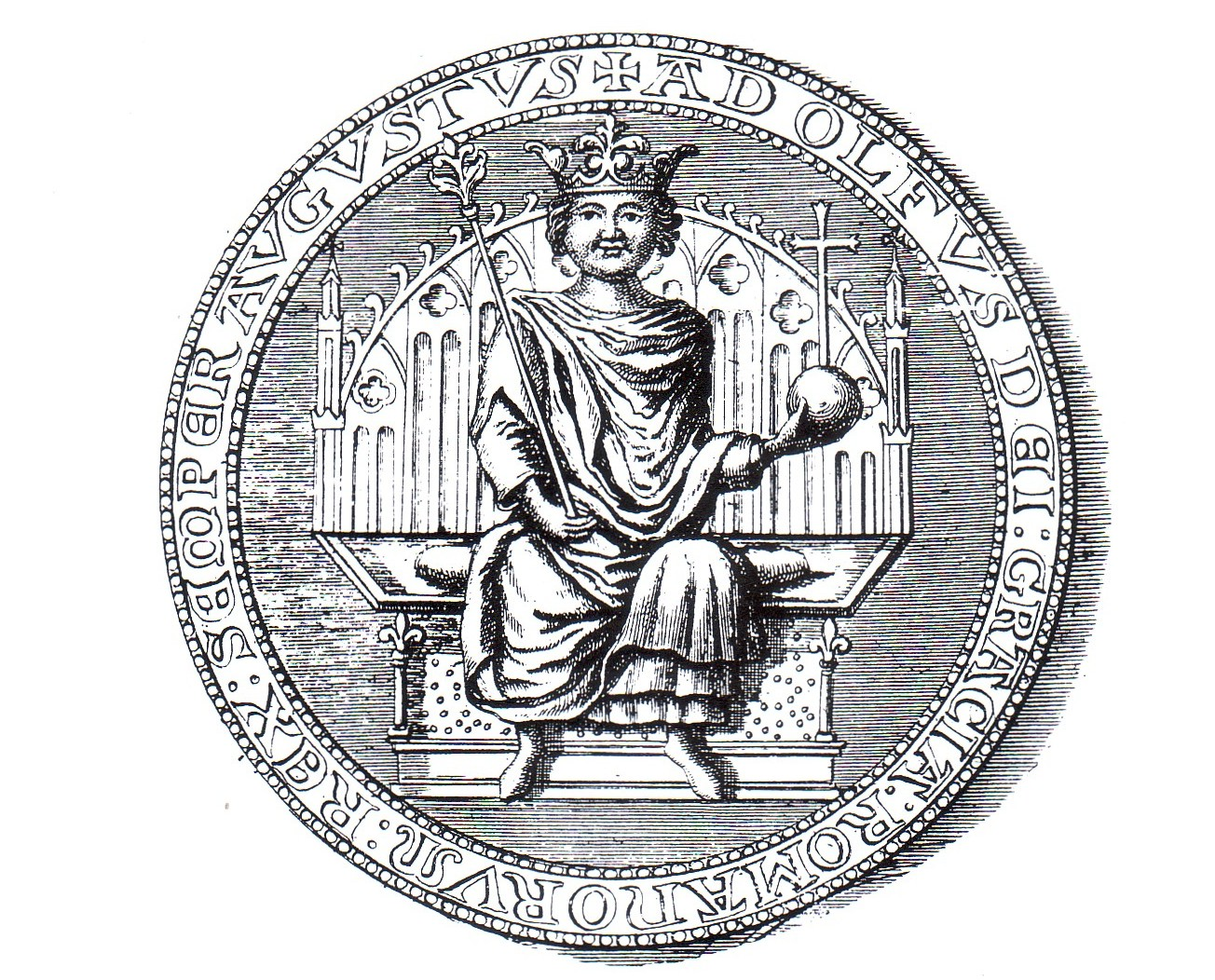 König Adolf von Nassau, Abzeichnung eines Wachssiegels in: J.M. Kremer: Originum Nassoicarum, 1779, Bd 1 S. 434